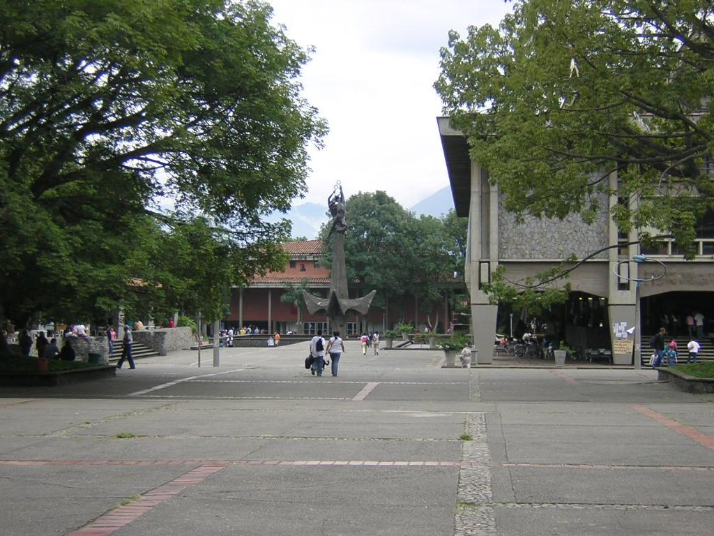 Plazuela Fernando Barrientos, Universidad de Antioquia, Medellín, Colombia (esta foto la tome yo, y la libero al dominio público)